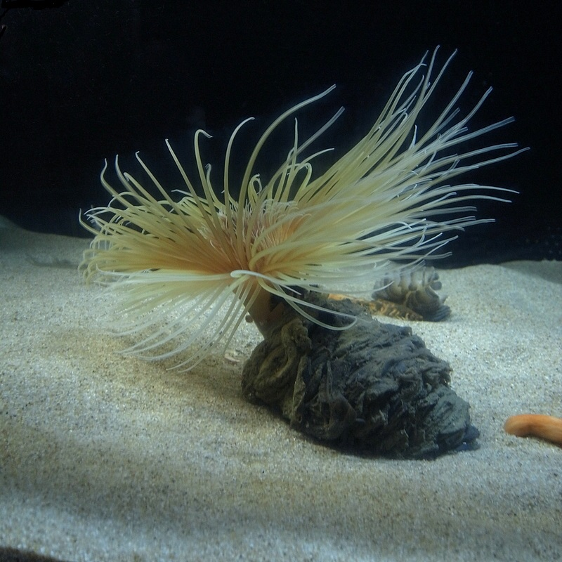 Cerianthus filiformis en SUMA AQUALIFE PARK, Kobe, Japón